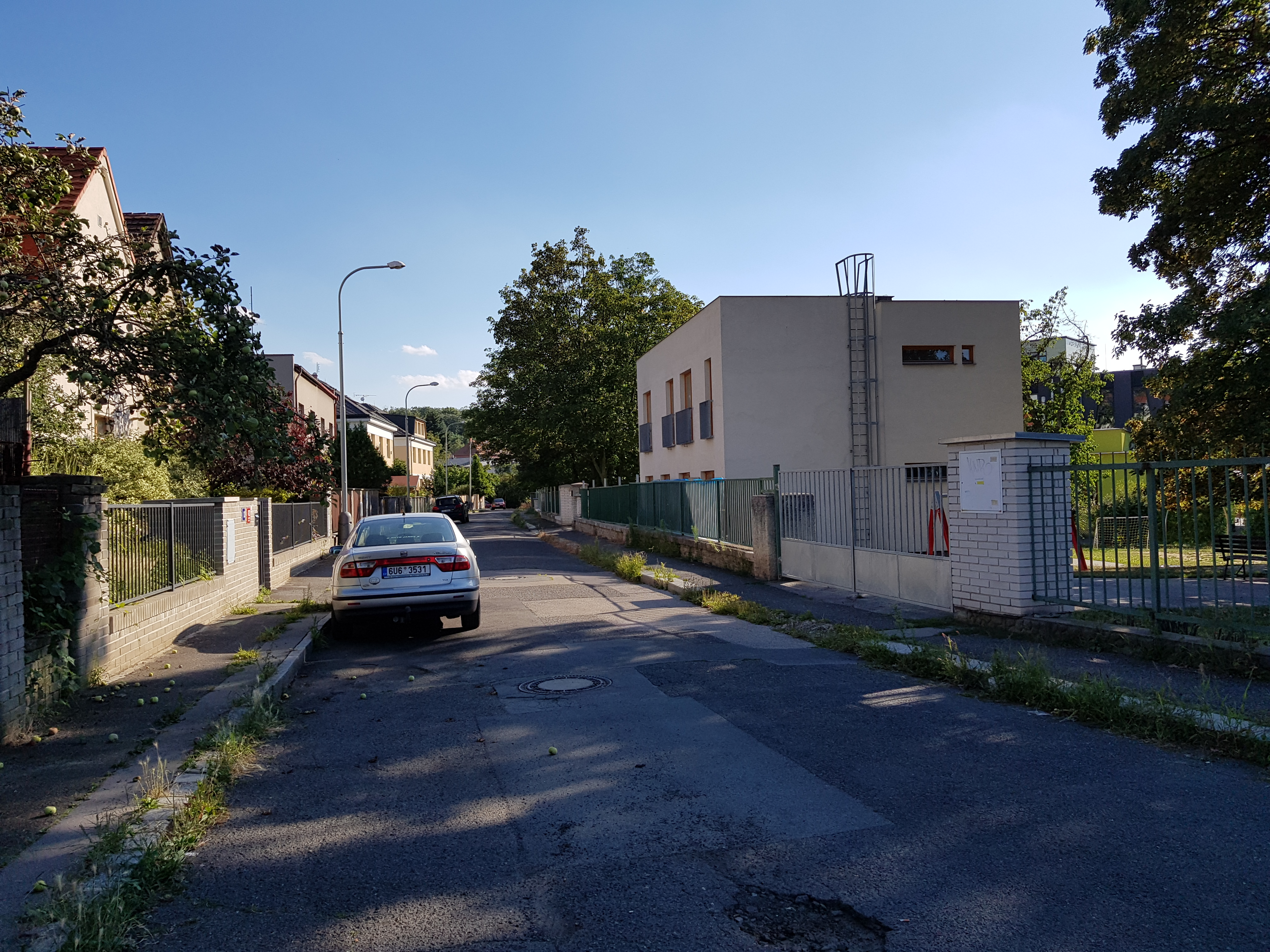 Ulice Svépravická, Praha 14-Hloubětín, pohled od ulice Šestajovická směrem na jihozápad